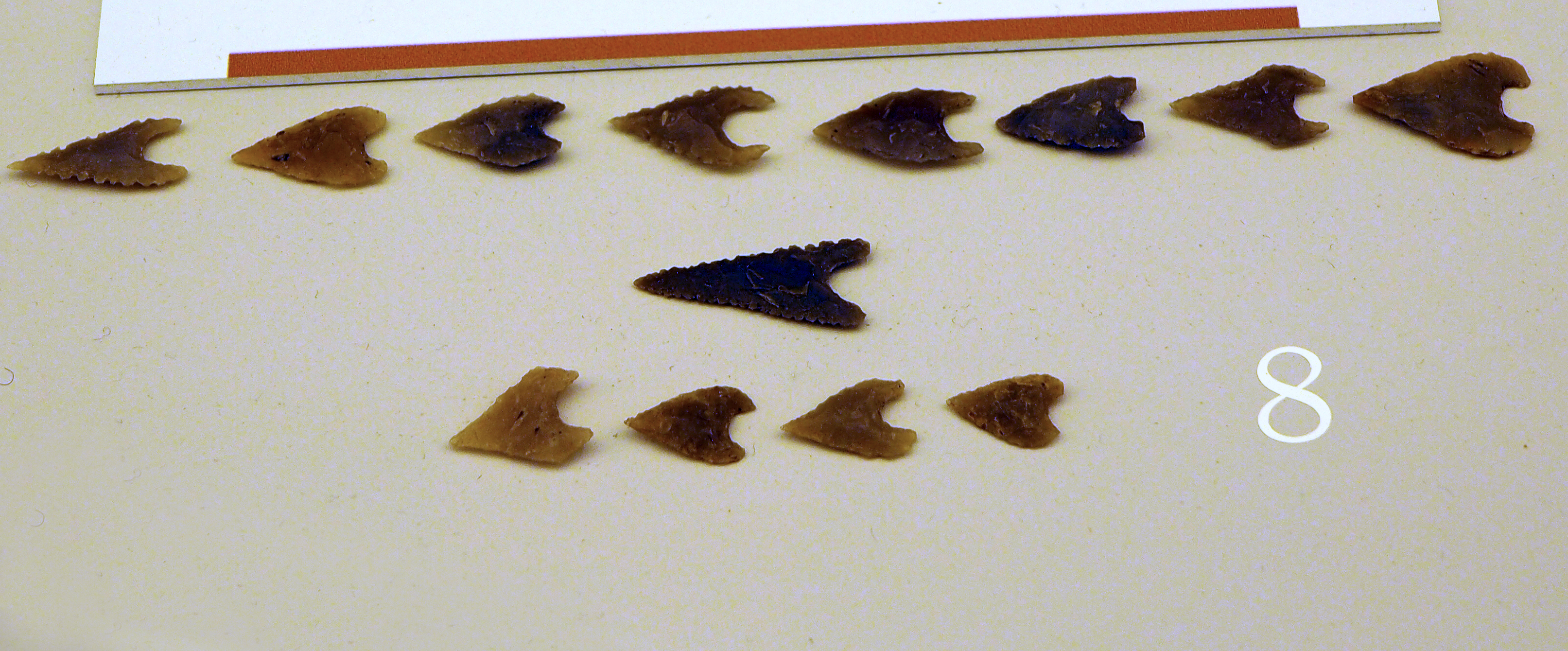 Pfeilspitzen (Ältere Bronzezeit) aus Ausgrabungen Bleckmar und Wardböhmen, Niedersachsen, Germany